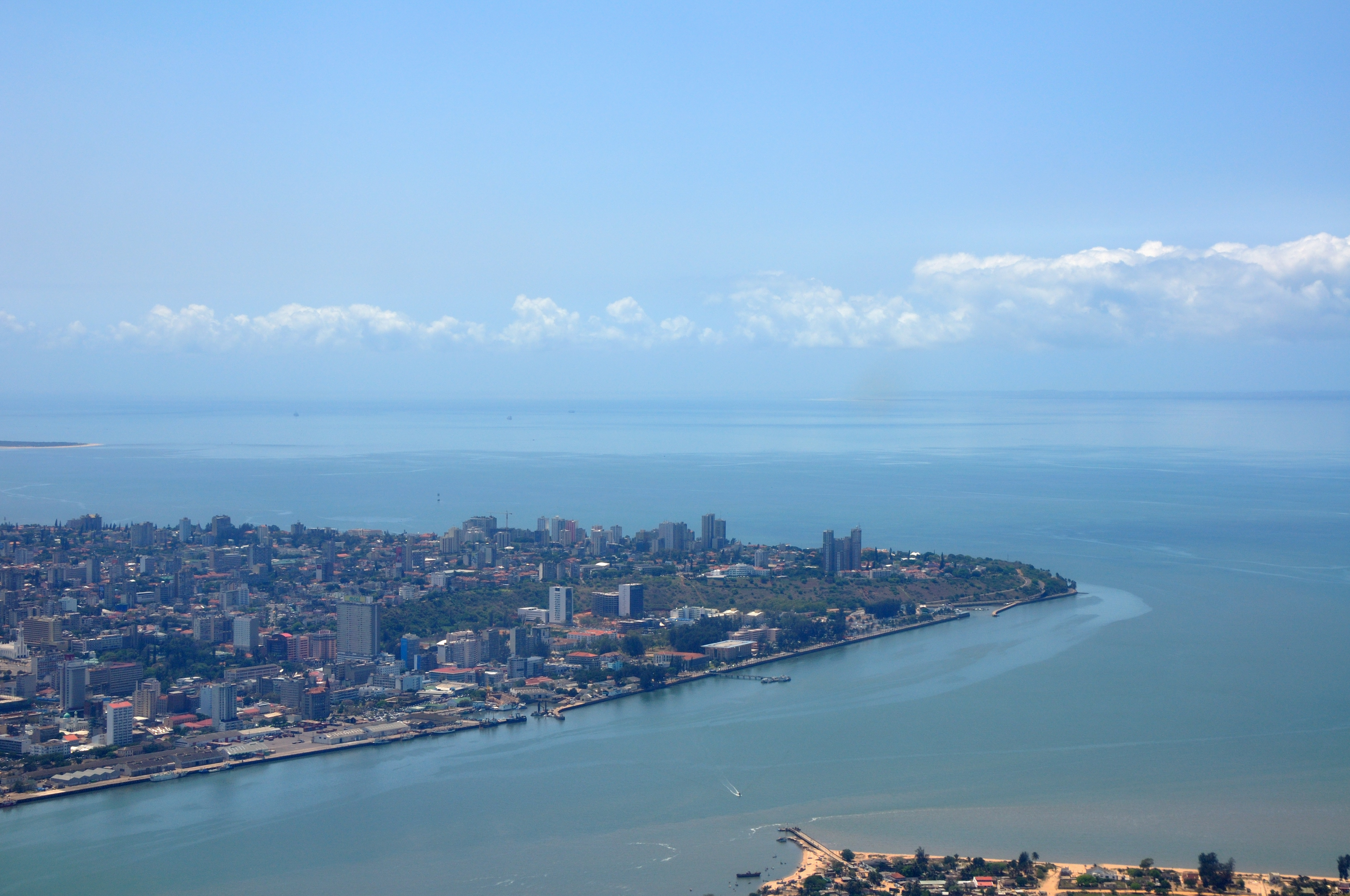 Mozambique, approach into Maputo